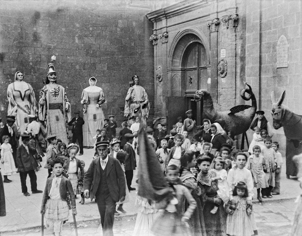 Solsona. Cèsar August Torras i Ferreri (ca. 1920)